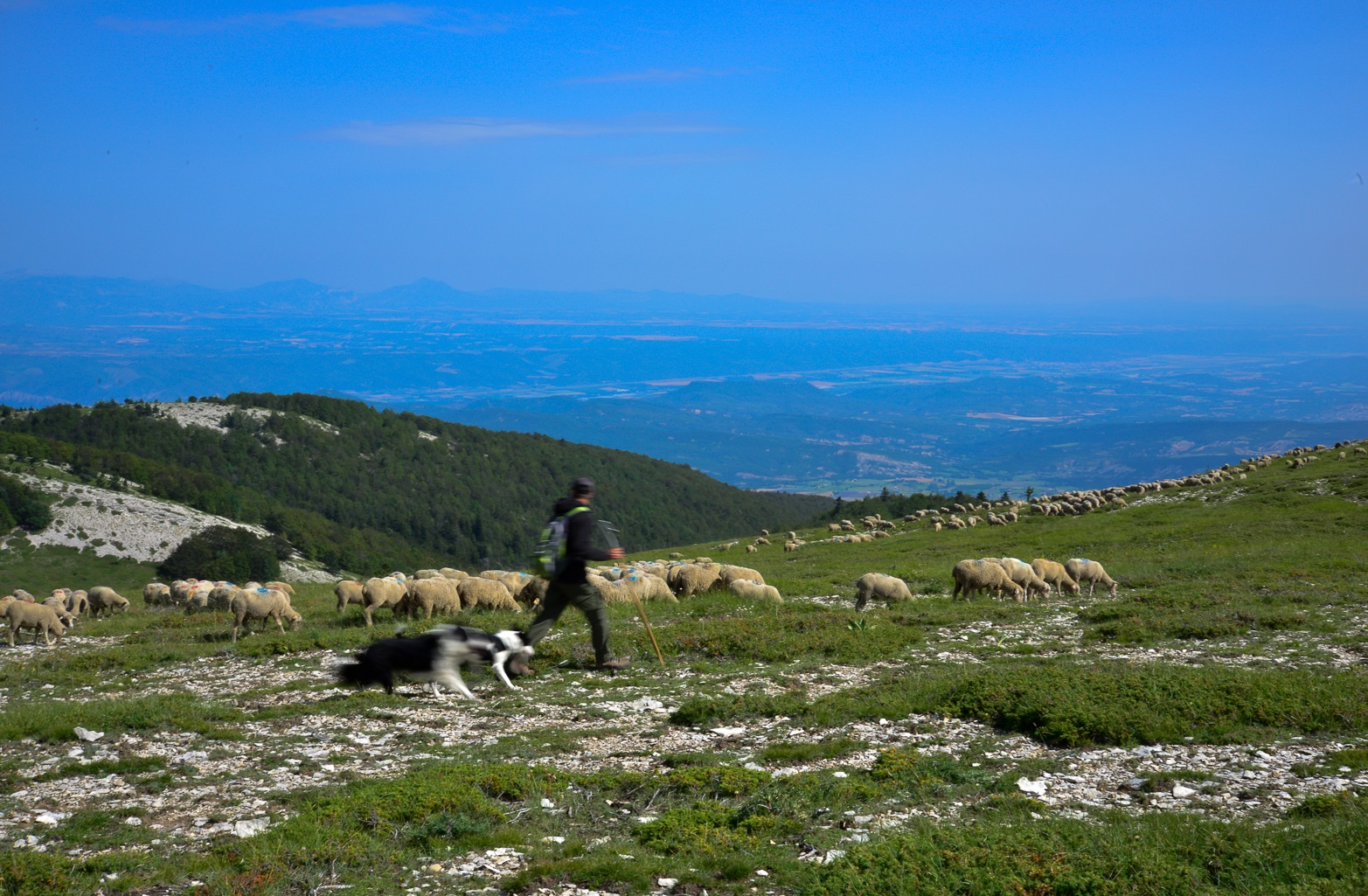 Berger et son troupeau dans la montagne de Lure